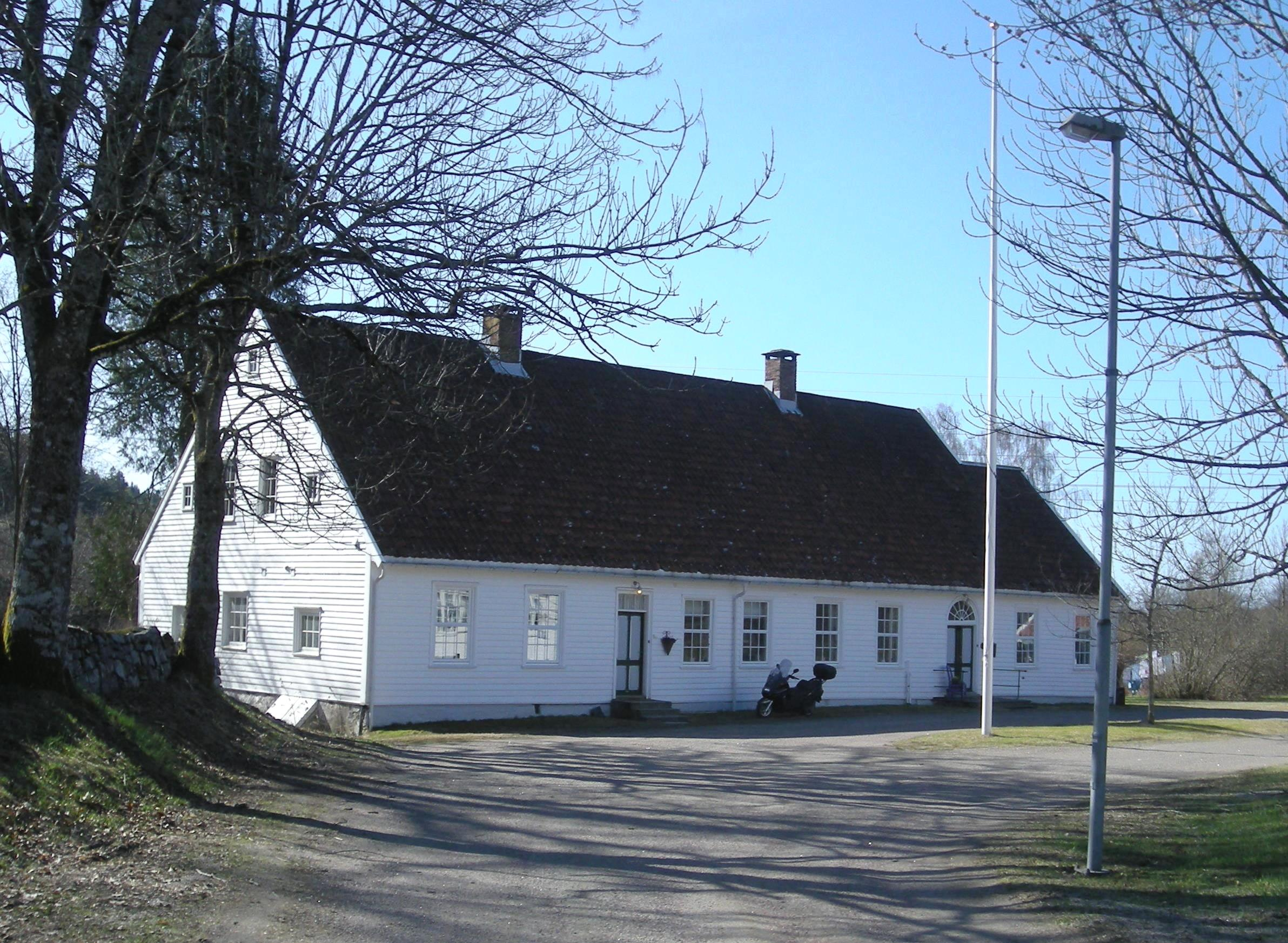 Tveit prestegård i Kristiansand kommune